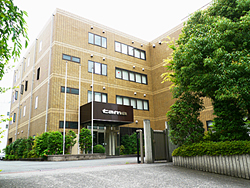 多摩電子工業株式会社 本社外観